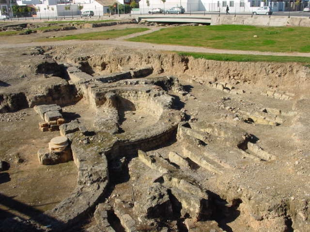 Yacimiento arqueológico de Cercadilla, en Córdoba (España). Palacio de Maximiano Herculano.